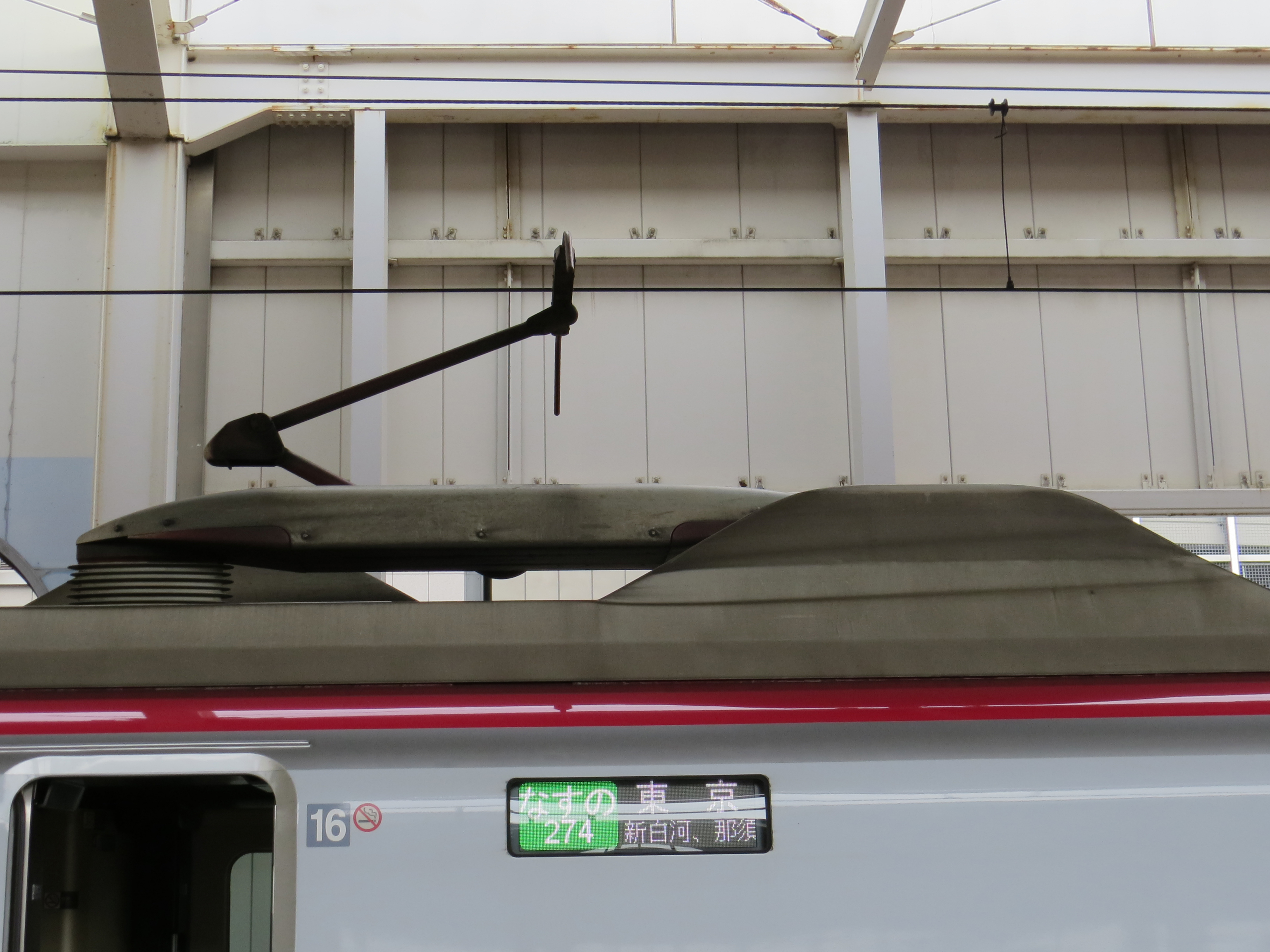 JR東日本 E6系新幹線 パンタグラフと遮音板 (E629-10)